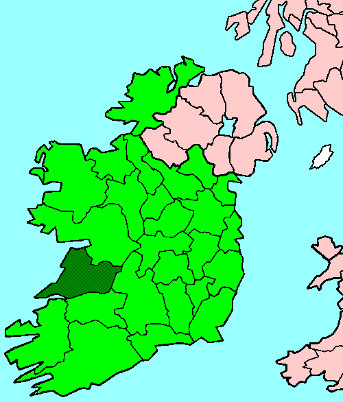 Clare